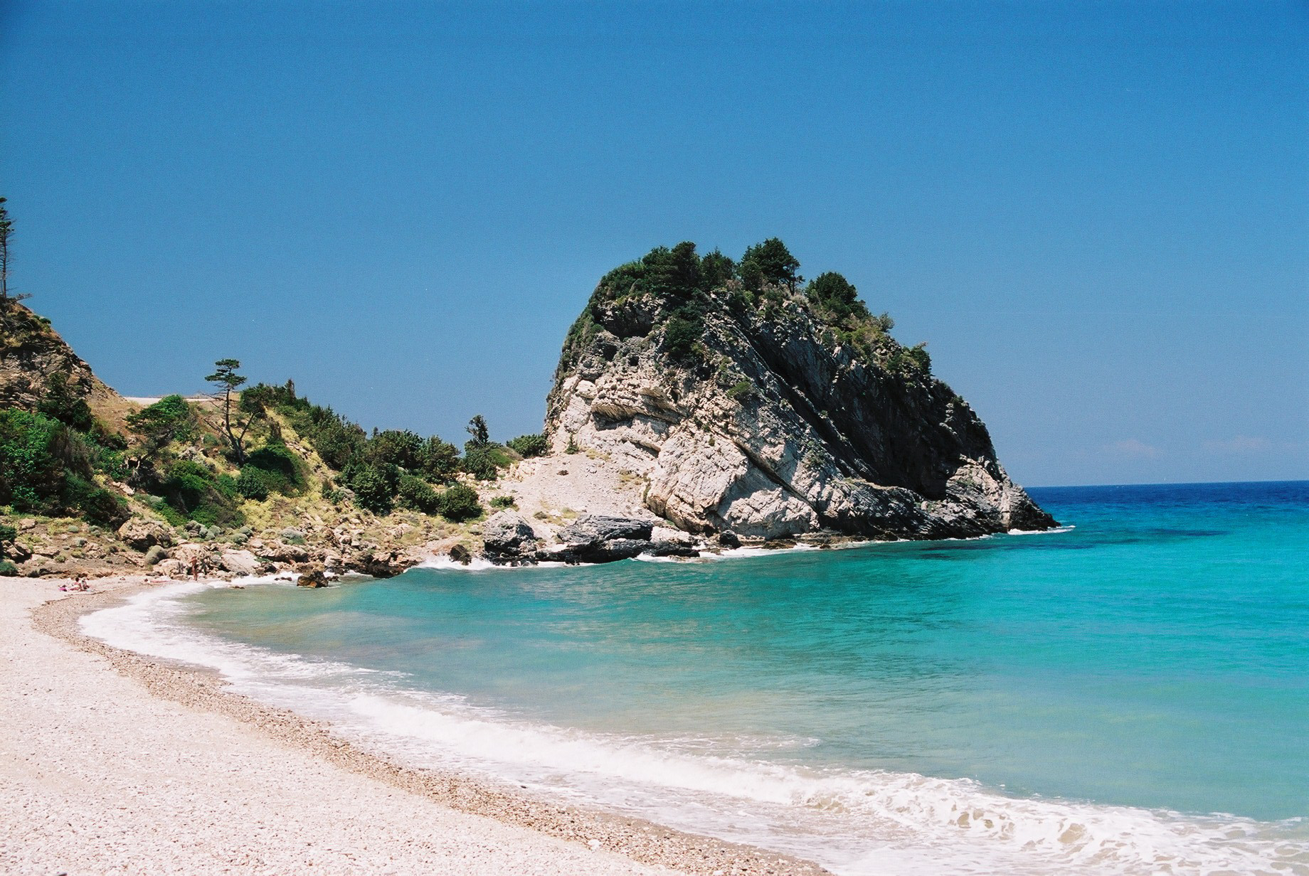 Potami-Bucht auf der Insel Samos (Griechenland)